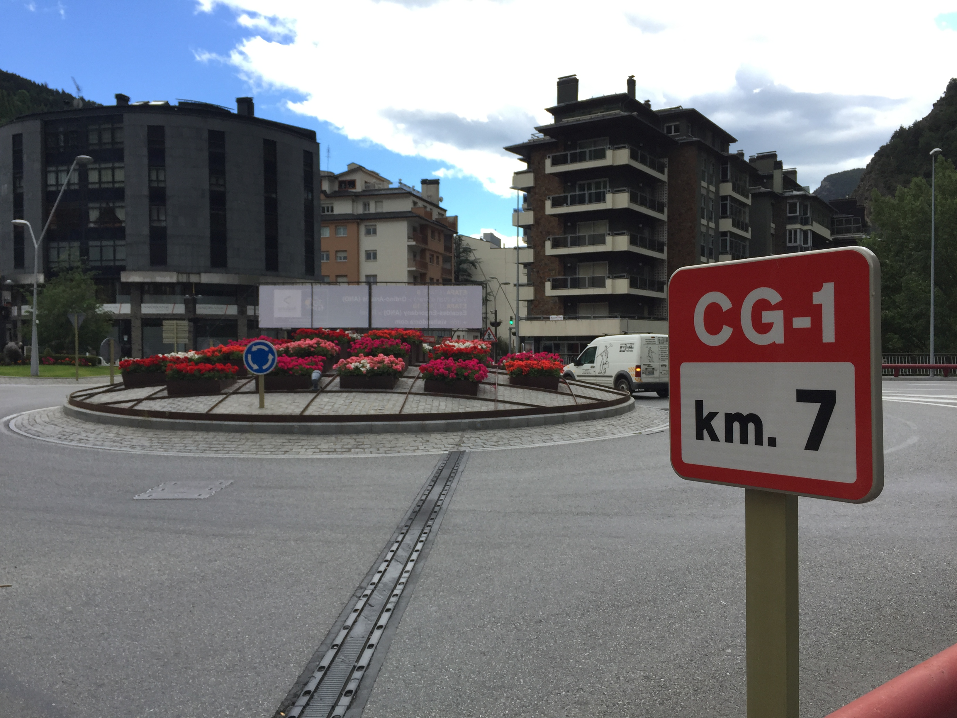 cg1 road Andorra